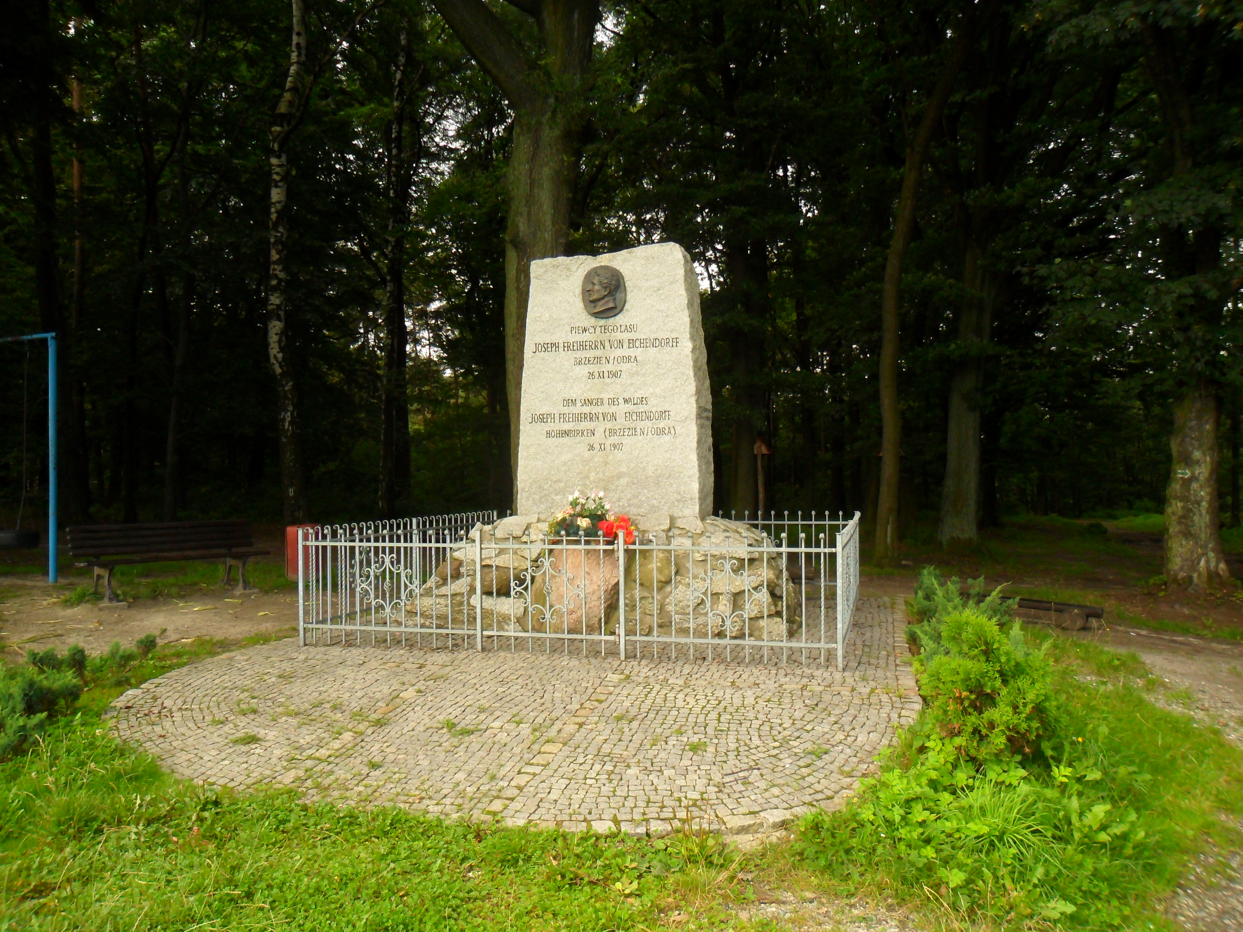 Pomnik Josepha von Eichendorffa w Raciborzu-Brzeziu